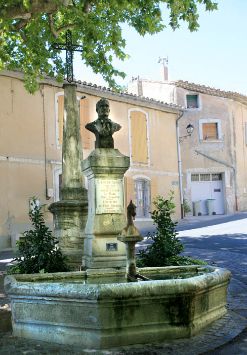 Village of Châteauneuf-de-Gadagne in Vaucluse, France